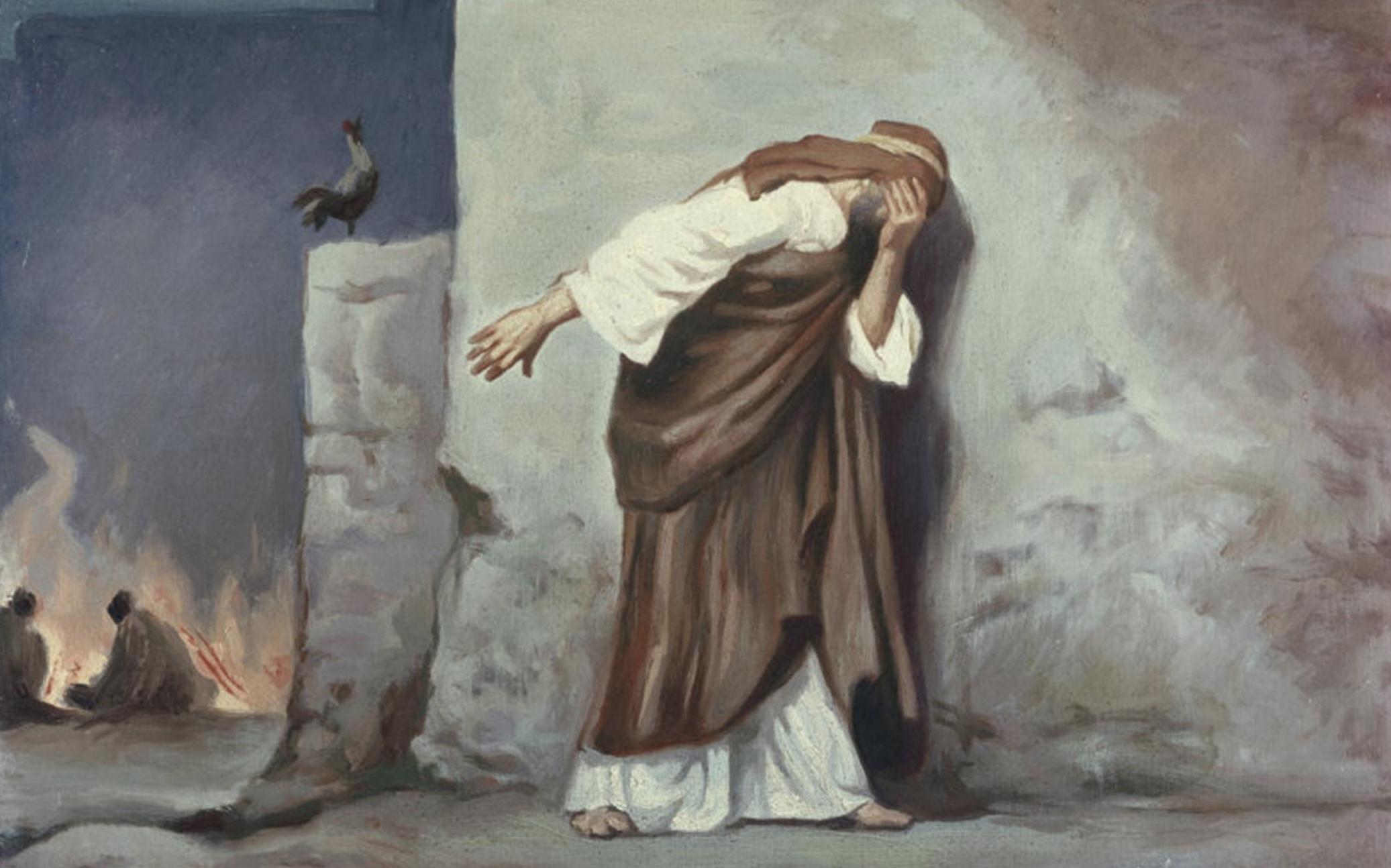 Peter's denial